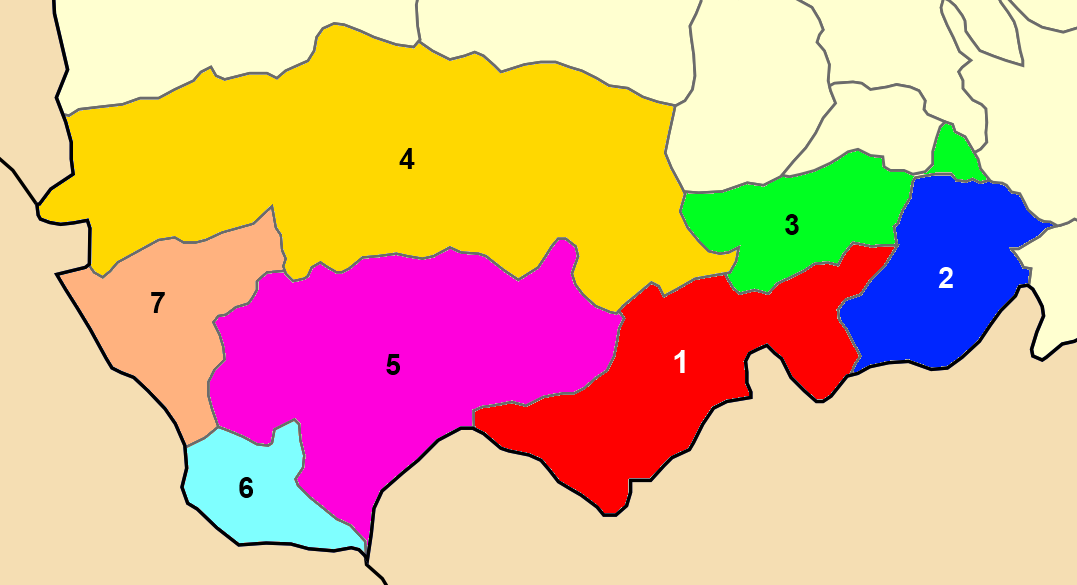 Χάρτης των ενοτήτων (και πρώην δήμων) από τις οποίες αποτελείται ο Δήμος Πύλης